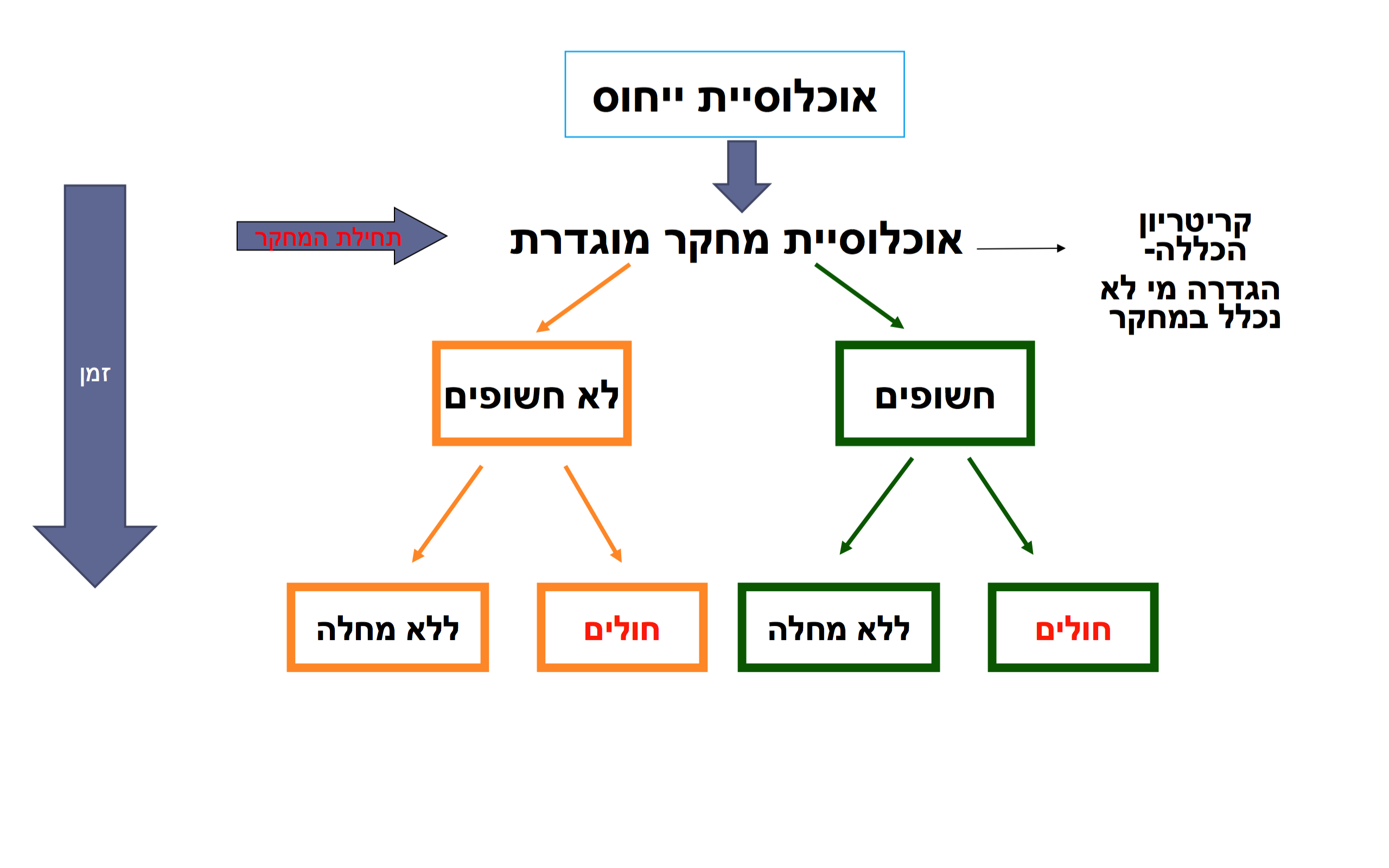 תיאור בחירת אוכלוסיות המחקר (חשופים ולא חשופים)